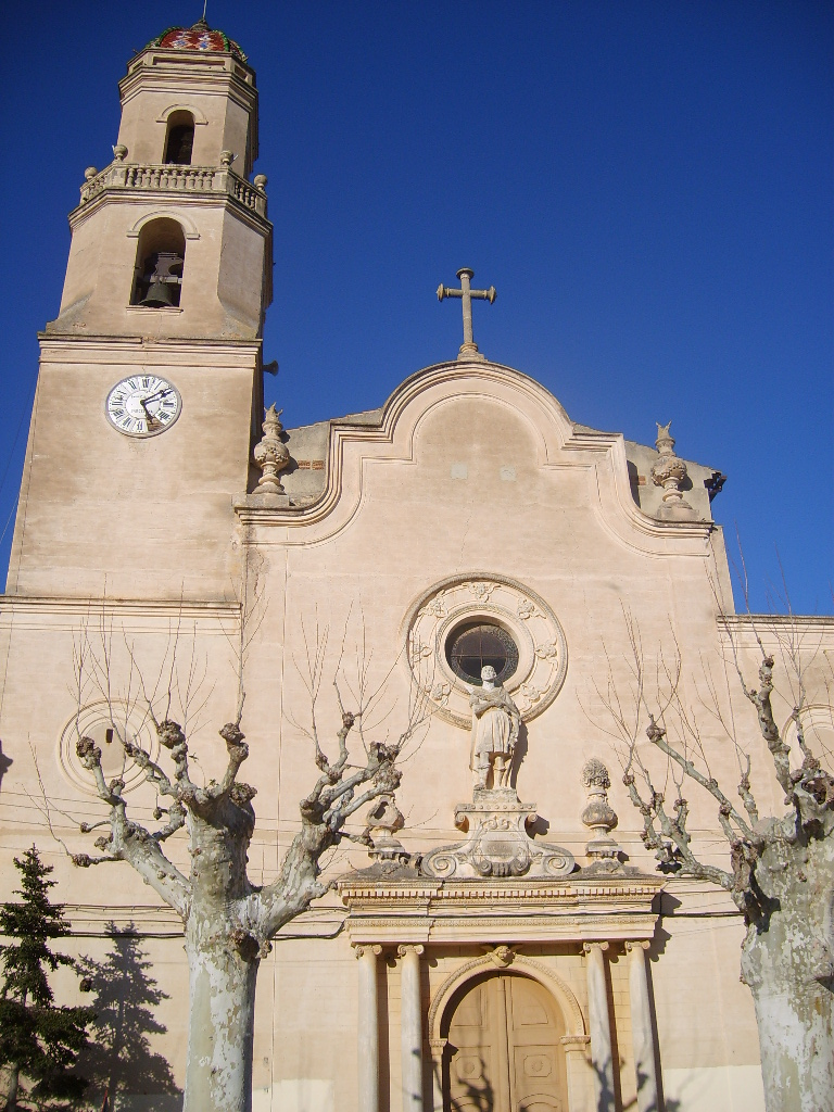 Església de Sant Genís. Torrelles de Foix